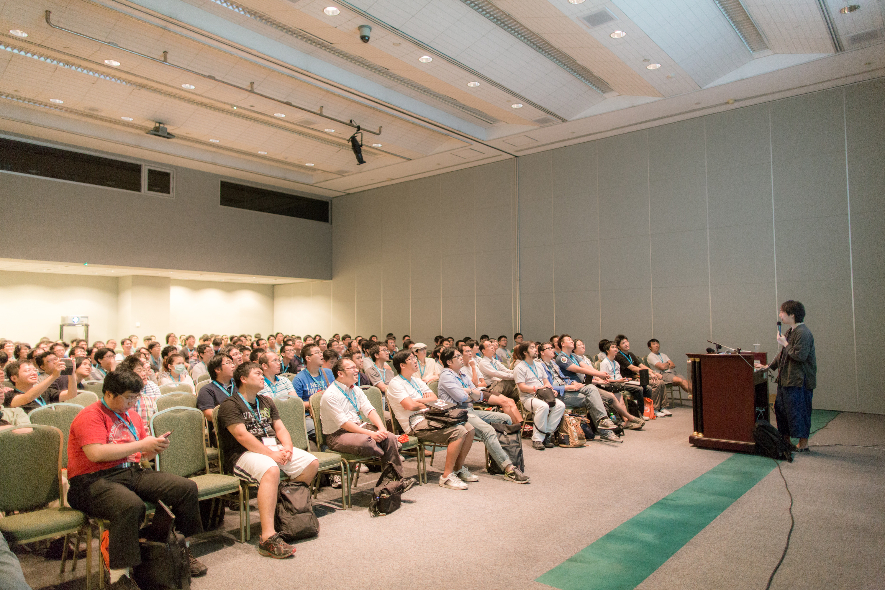 鳳 (唐鳳)：萌典：moedict.tw